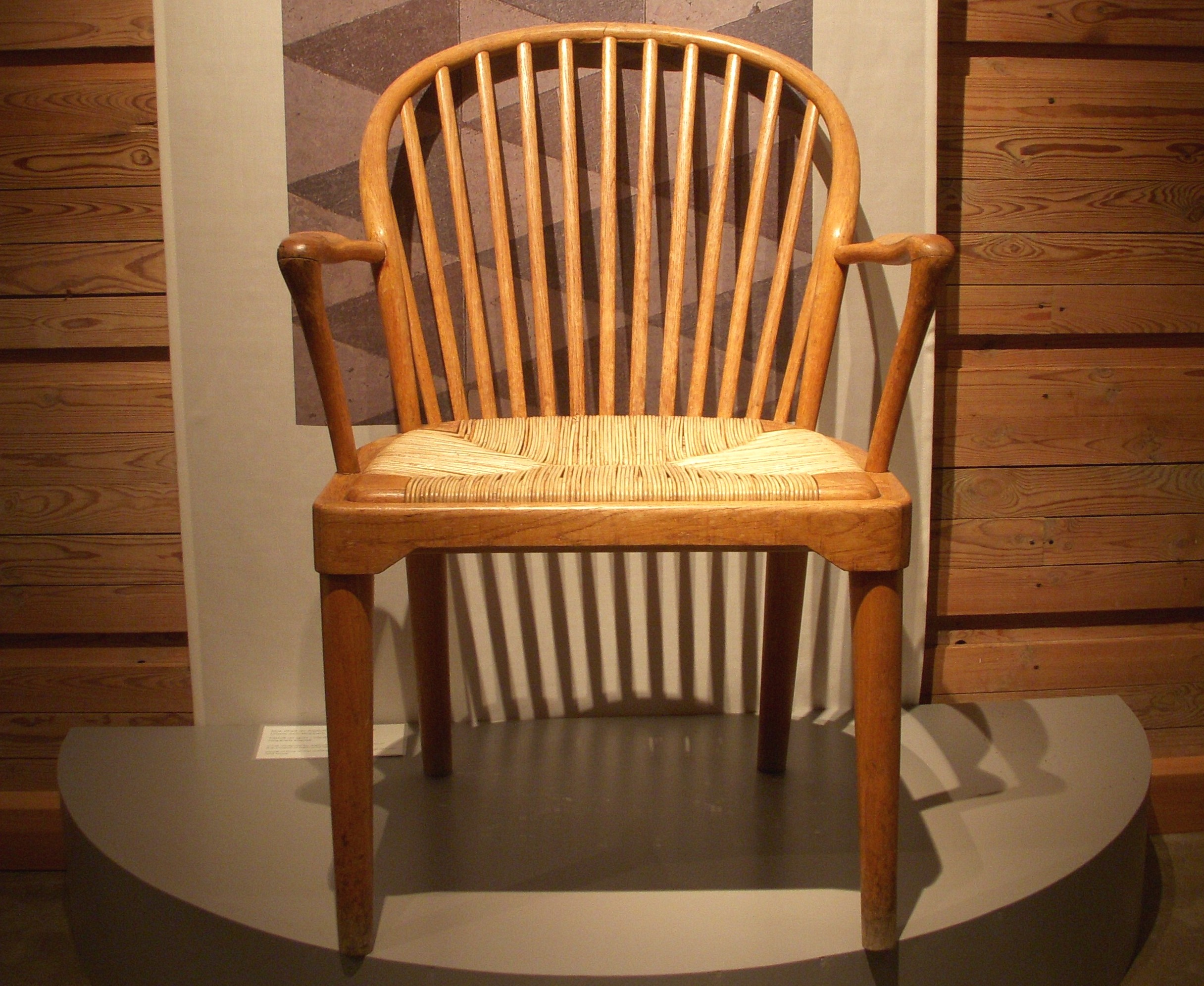 Gunnar Asplunds stol till "Trons och Hoppets kapell" på Skogskyrkogården i Stockholm